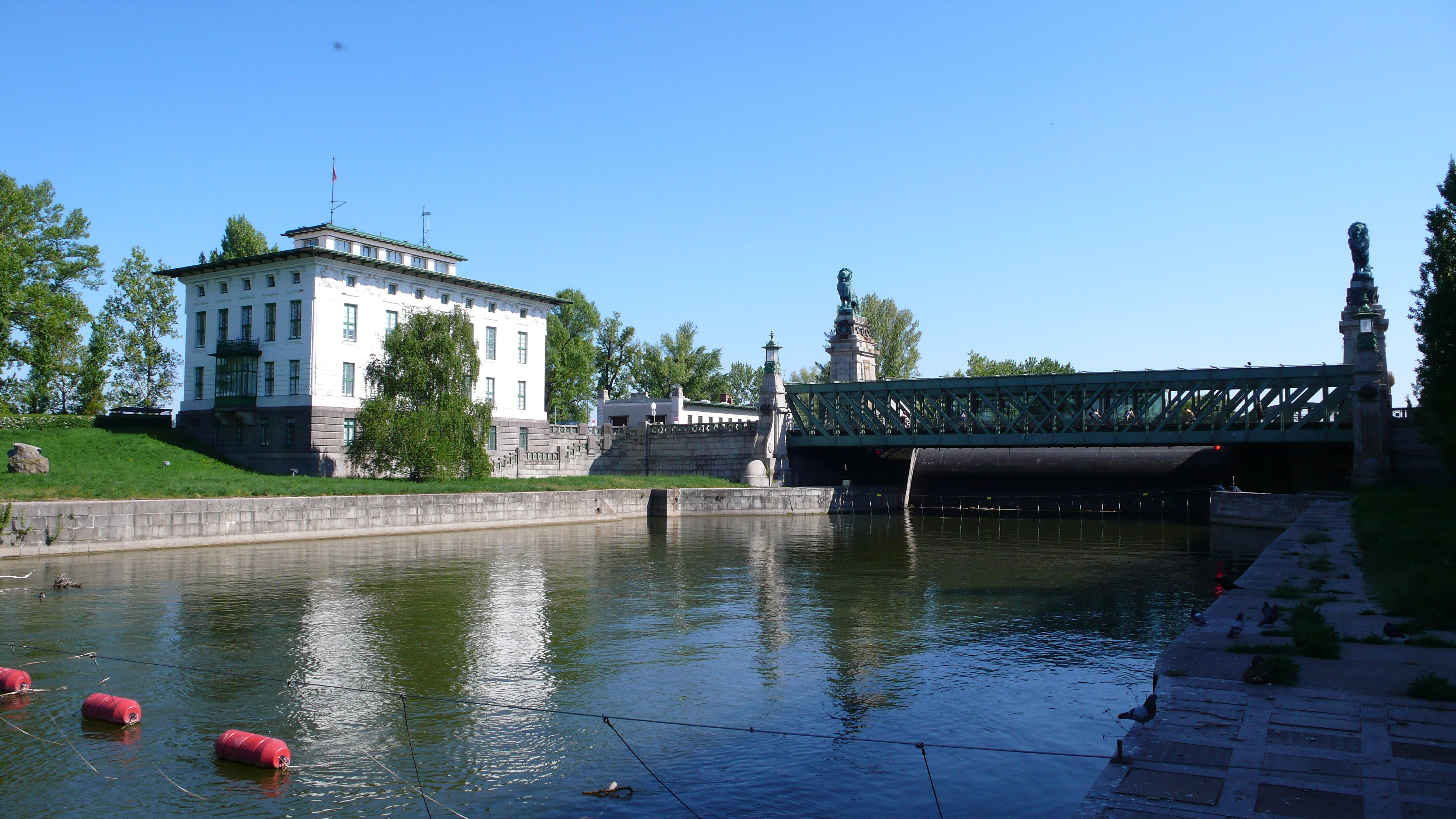 Nußdorfer Wehr mit Schemerlbrücke, Verwaltungsgebäude (Otto Wagner)